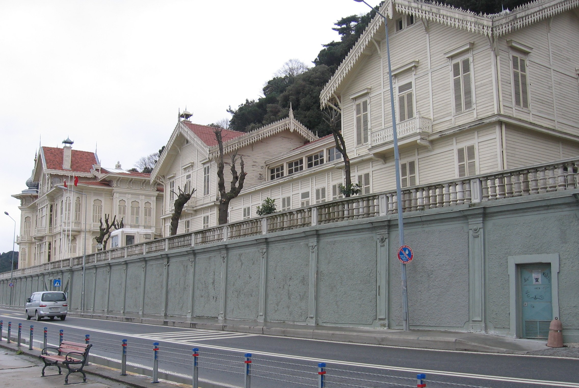 Huber Köşkü